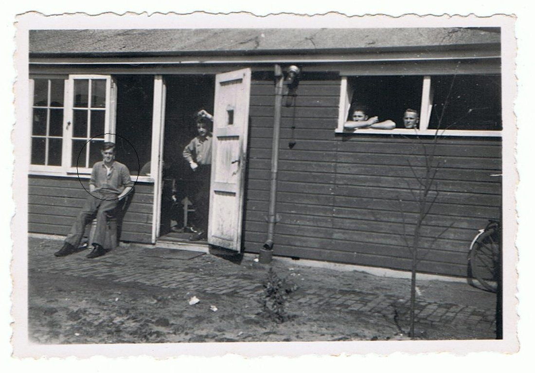 Wim Simons in Kamp Fochtelo 1944